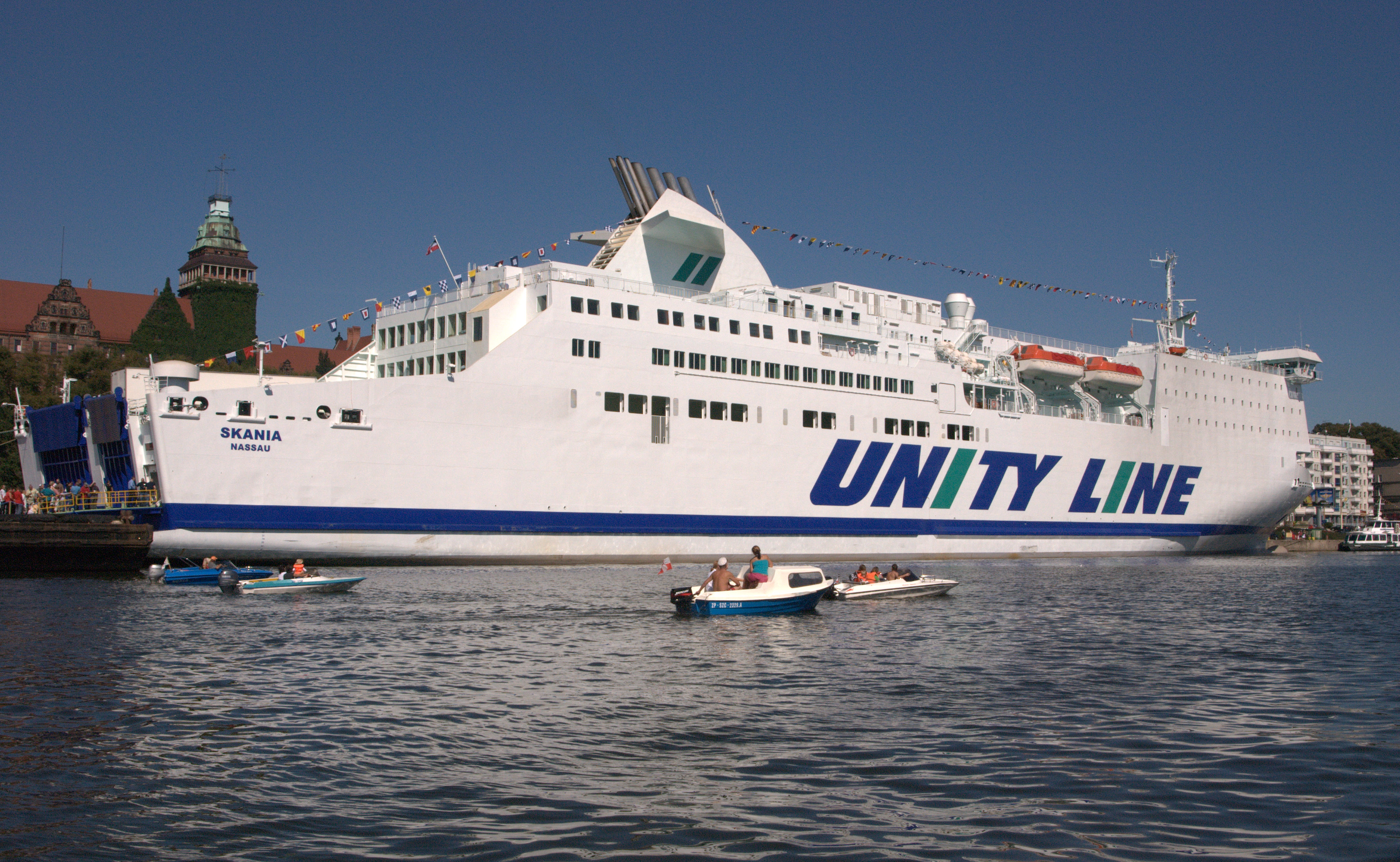 MF Skania